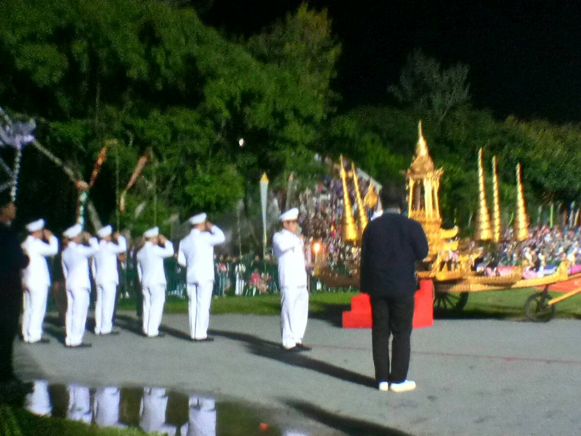 การอัญเชิญไฟพระฤกษ์เพื่อนำไปจุดที่กระถางคบเพลิงในการแข่งขันเจียงฮายเกมส์